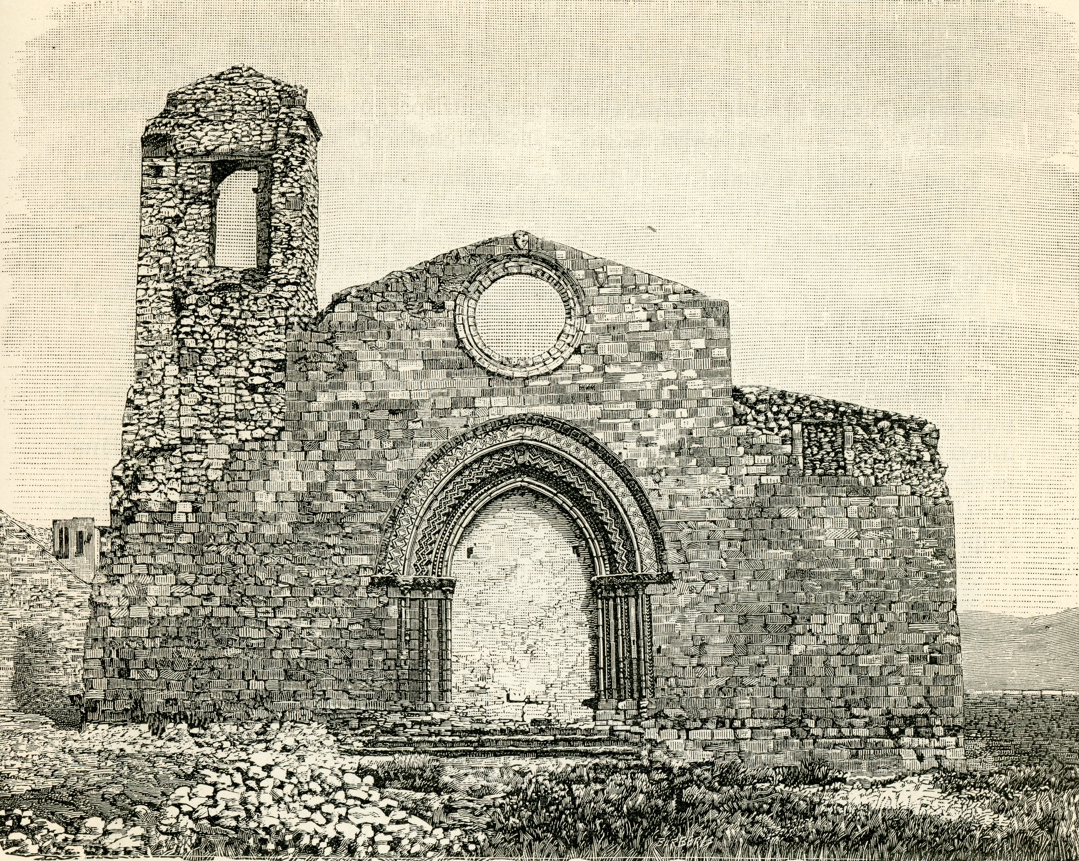 Bivona: Chiesa diroccata del secolo XI (xilografia di Barberis).